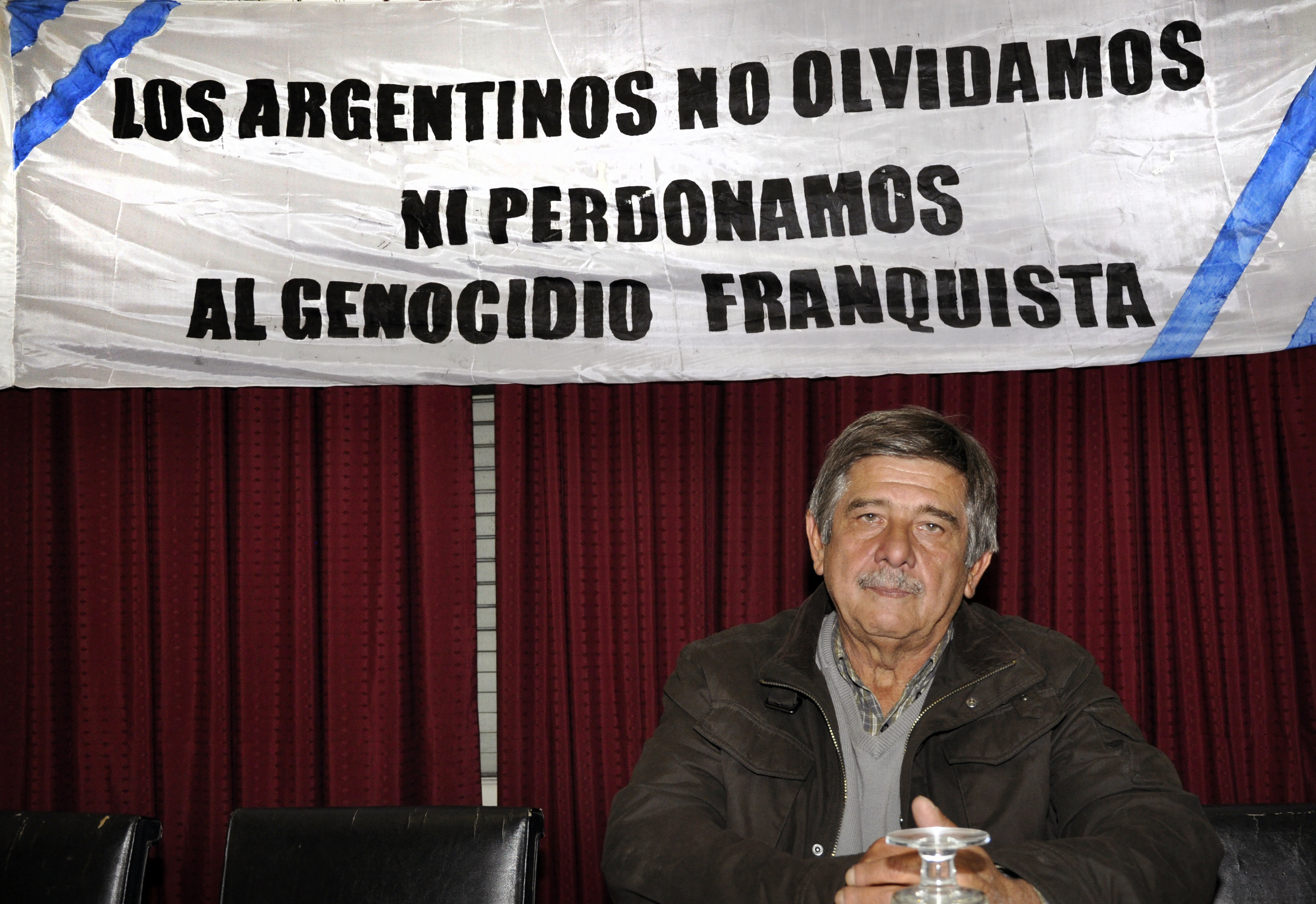 Carlos Slepoy Prada en la Federación Gallega- Buenos Aires